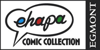 Logo der Ehapa Comic Collection (ECC), ein Label der EGMONT Verlagsgesellschaften mbH